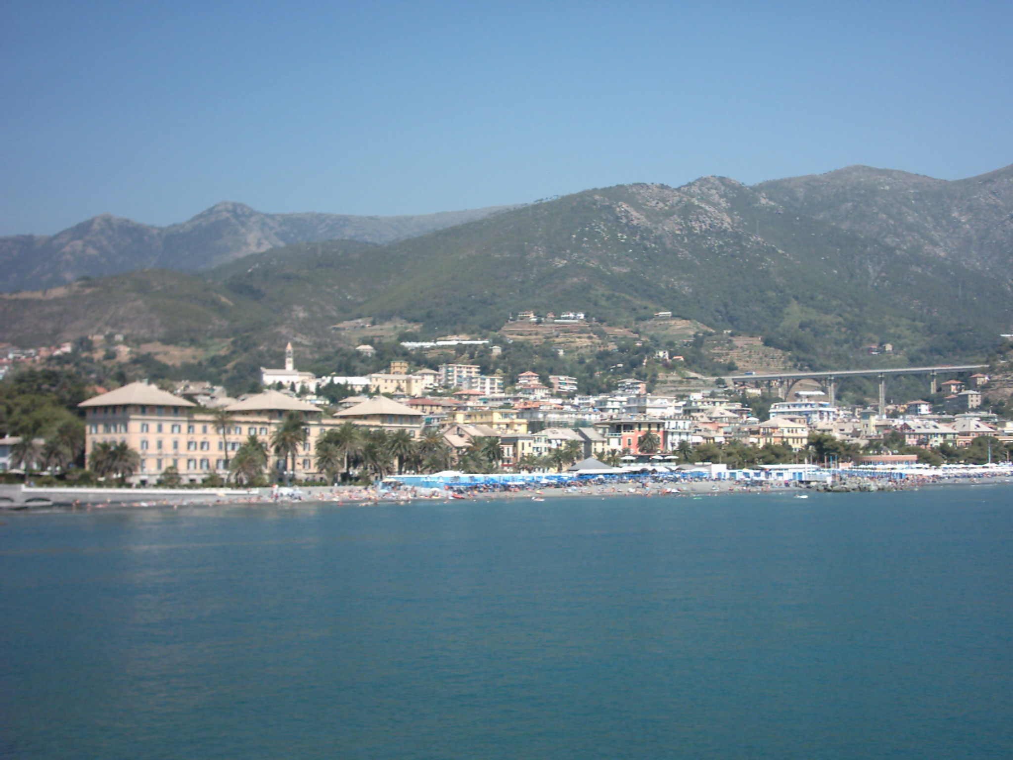 Arenzano gezien vanaf de Middellandse Zee